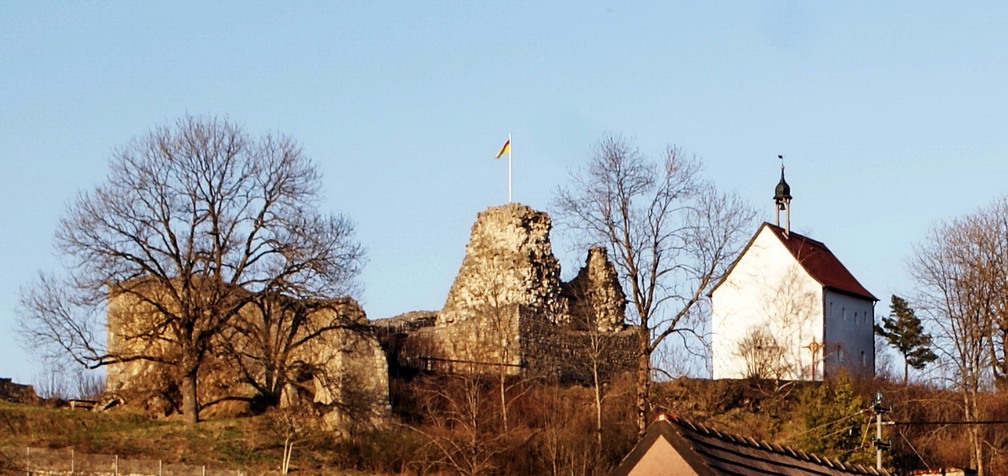 Veringenstadt Burgruine und Peterskapelle. (Blick aus Südwesten)